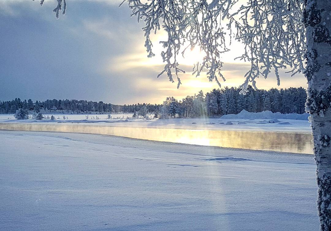 Skellefteälven i Arjeplog. Fotot är taget från Strömvägen.